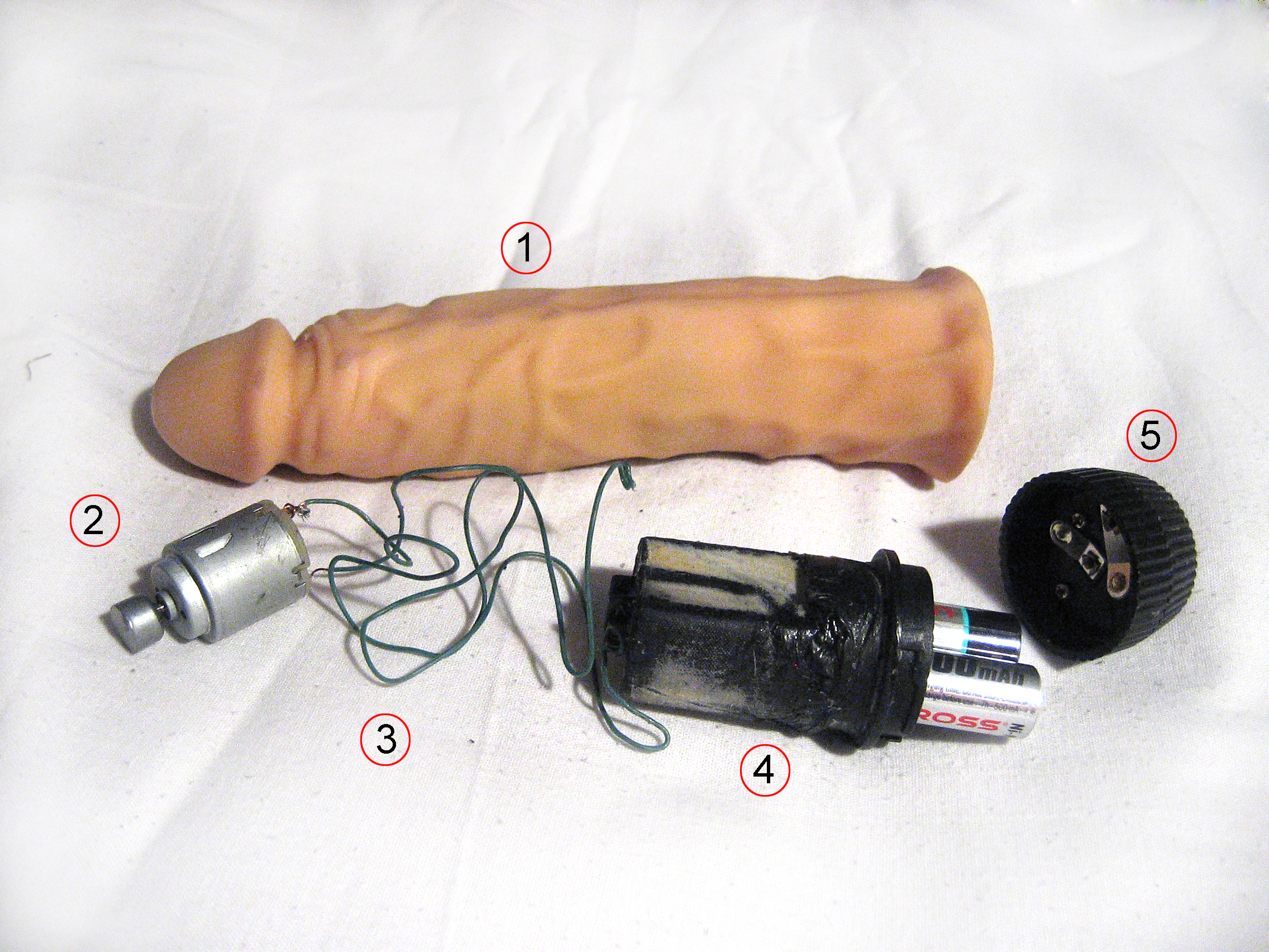 1 - полый фаллоимитатор,2 - электромотор,3 - проводки,4 - штучка, куда вставляются батарейки и сами батарейки,5 - реостат для регулирования силы вибрации